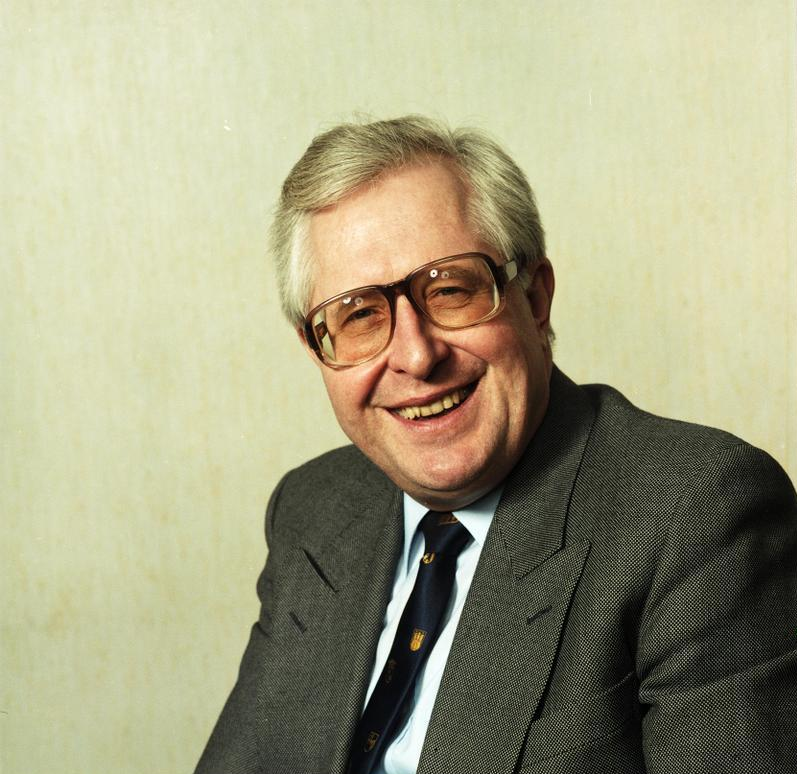 26.2.1988 Dr. Bernhard Vogel, Ministerpräsident des Landes Rheinland-Pfalz, Präsident des Bundesrates 1987/1988